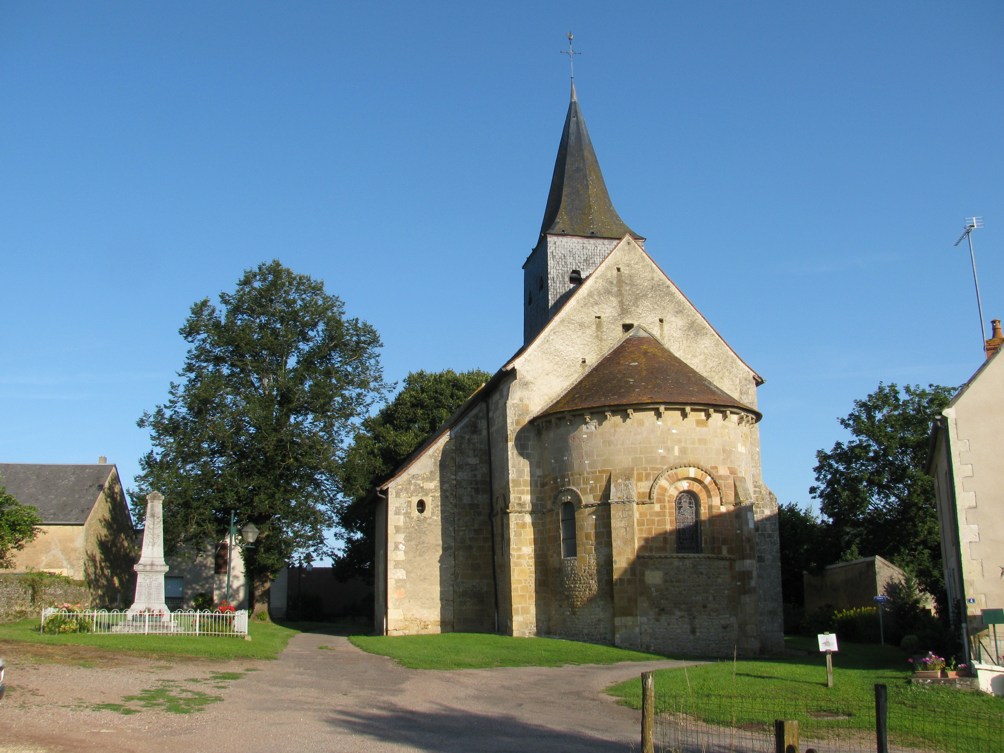 L'église saint-Louis de Montigny-aux-Amognes, Nièvre, France.